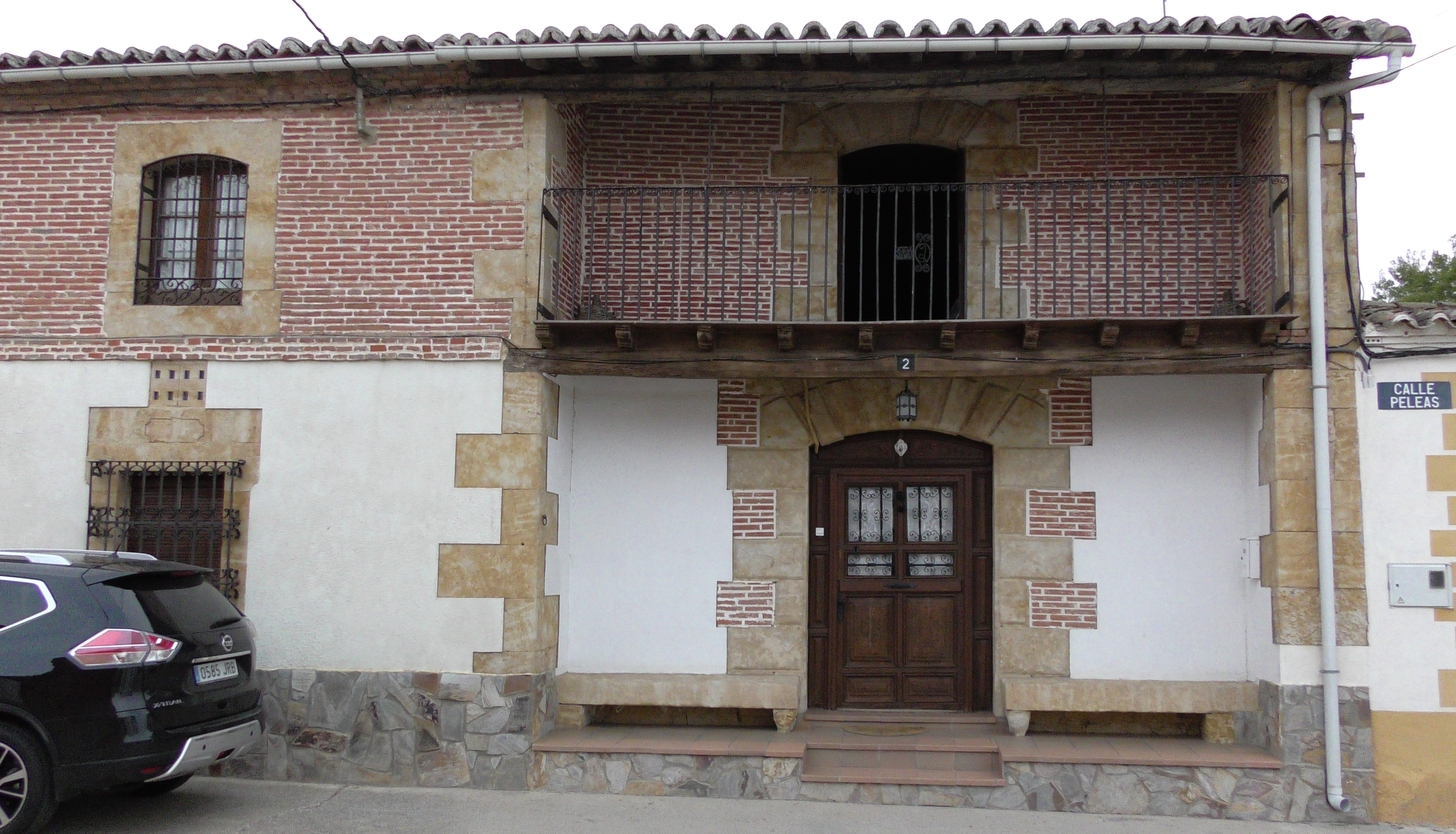 Cazurra